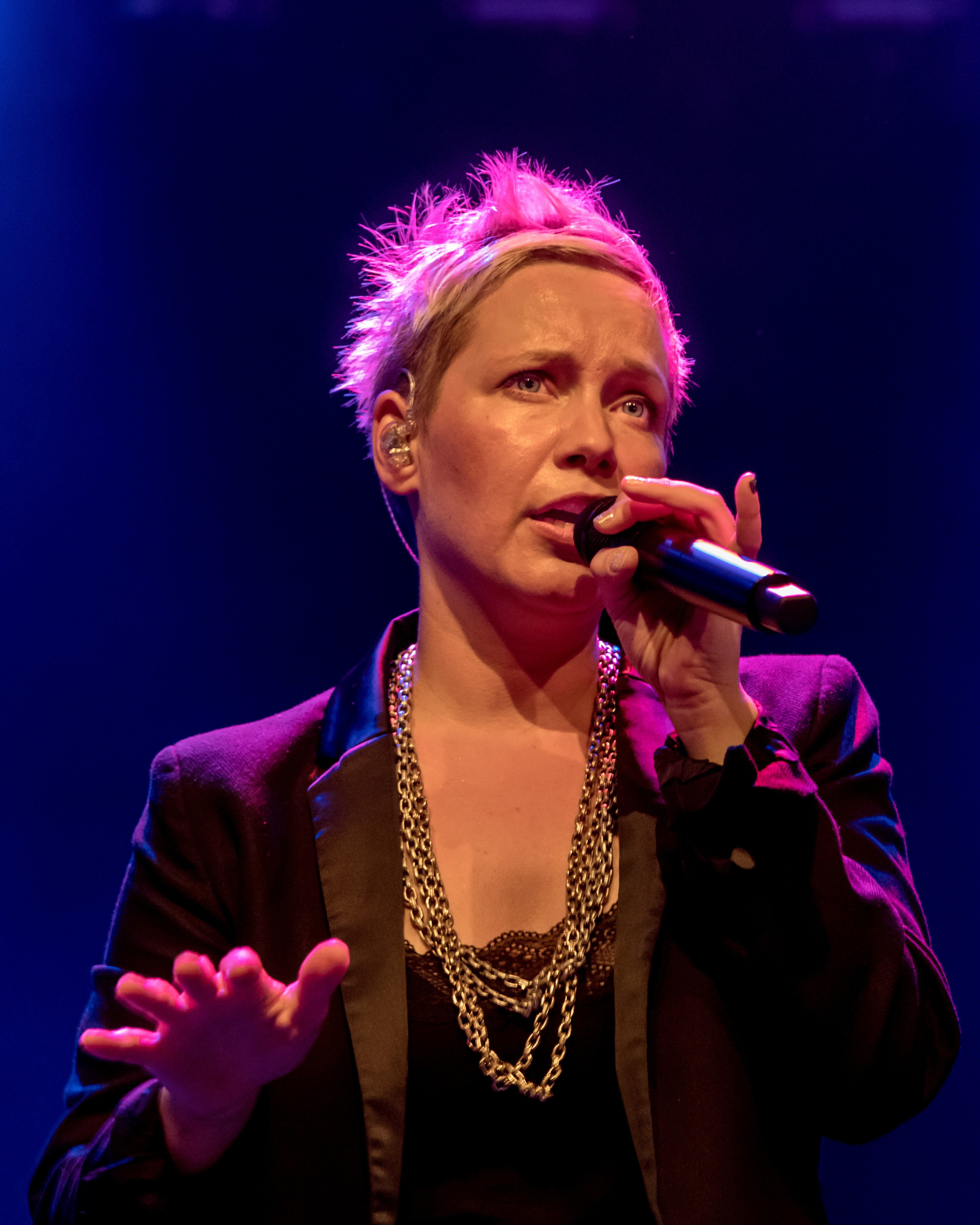 Bilder vom Zelt Musik Festival 2017 in Freiburg im Breisgau Slixs auf der A capella Nacht am 19.07.2017